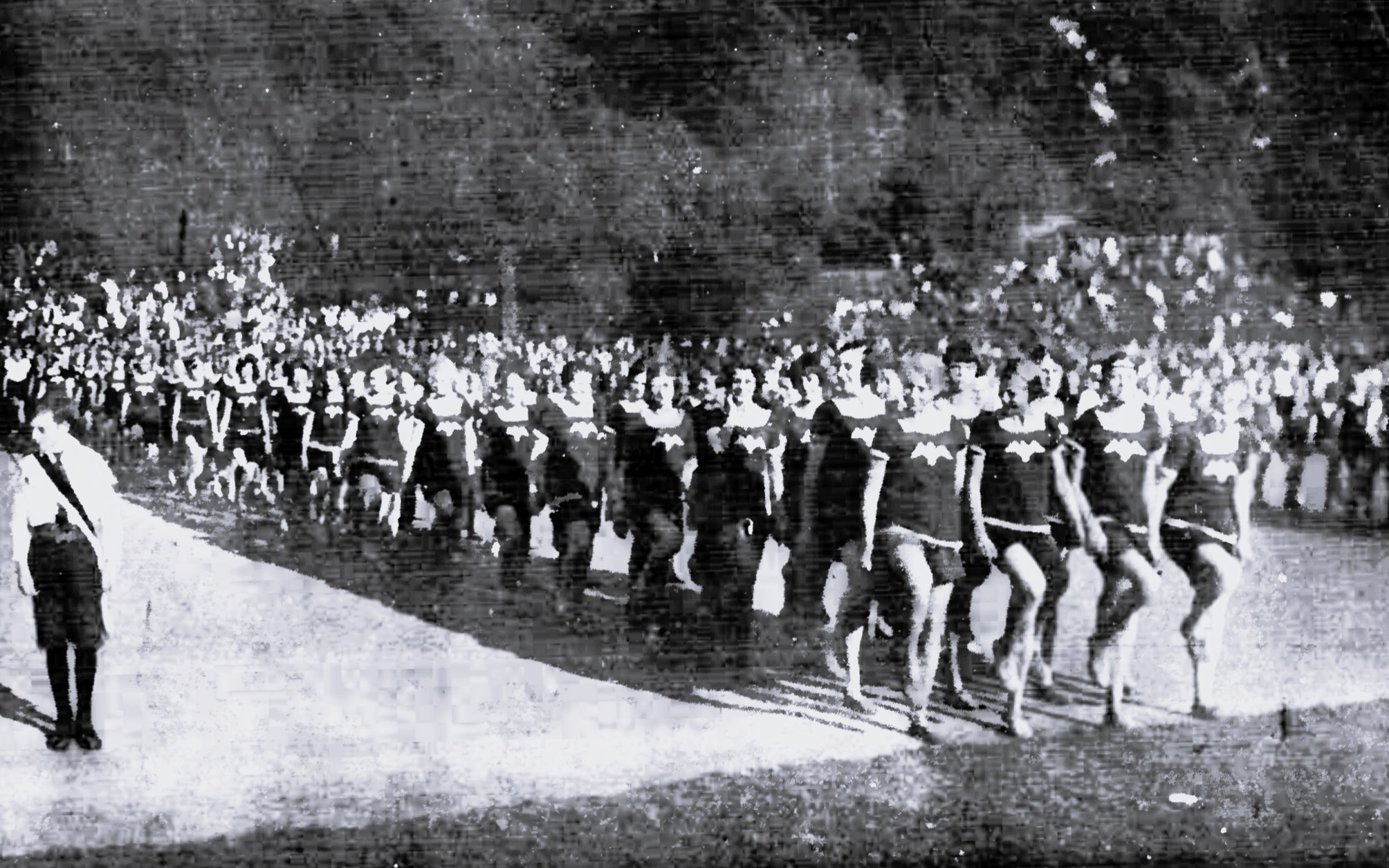 Am 13. September fanden auf dem Sportplatz Buniamshof die diesjährigen Kampfspiele der Lübecker Schulen statt. Gerade diese Veranstaltung, an der etwa 2000 Schülerinnen und Schüler aller Lübecker Schulen teilnahmen, zeigte, zeigte wie gerade Turnen und Sport Einzug in die Schulen gehalten hat. Ganz besonders gefallen konnten die Massenübungen der Knaben und Mädchen. In Säulen marschierten die einzelnen Abteilungen vor dem Podium auf und unter den Klängen der Schutzmannskapelle wurden die gymnastischen Freiübungen ausgeführt.